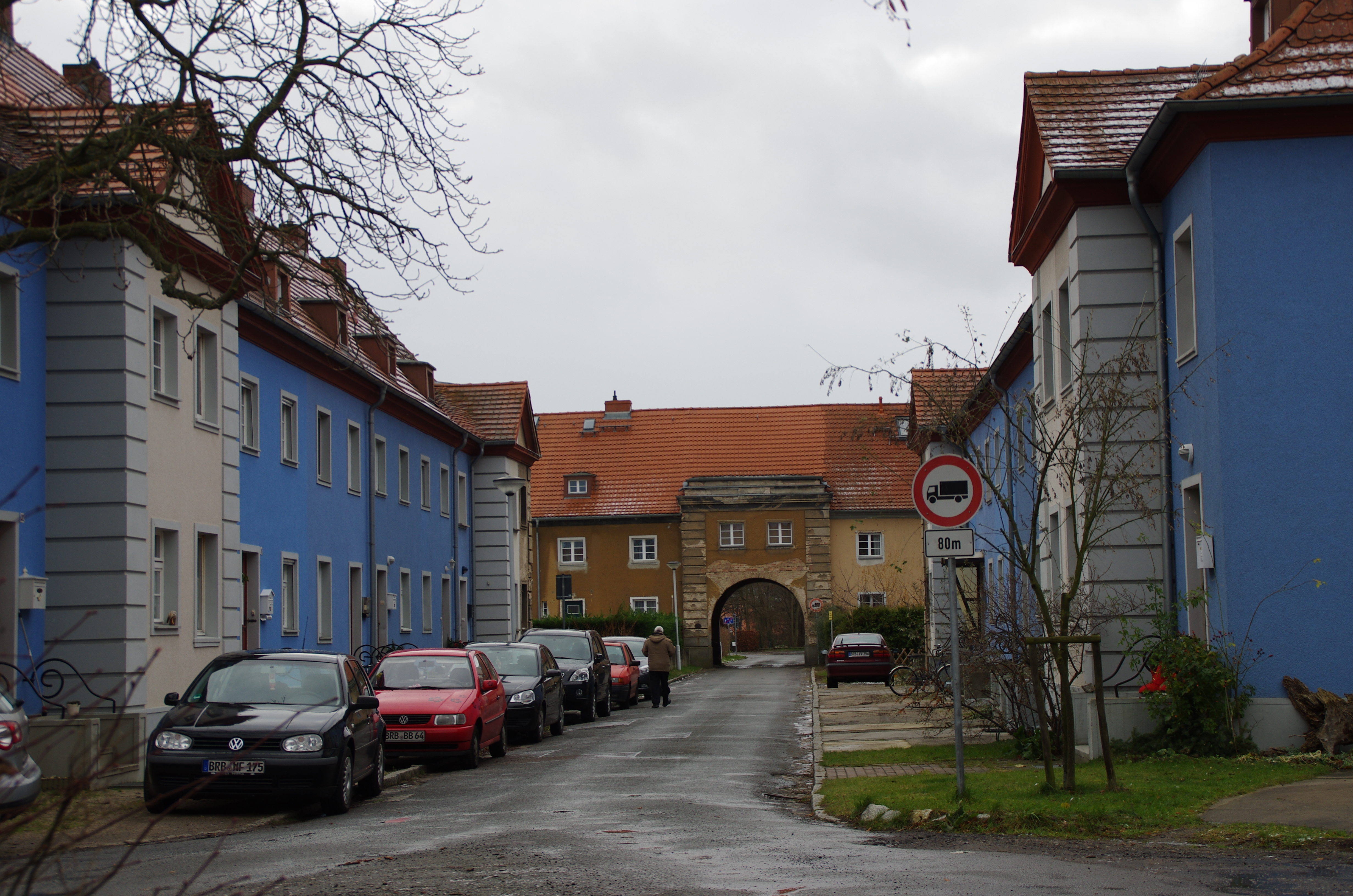 Brandenburg an der Havel Ortsteil Kirchmöser. Die Siedlung Kichmöser West steht unter Denkmalschutz.